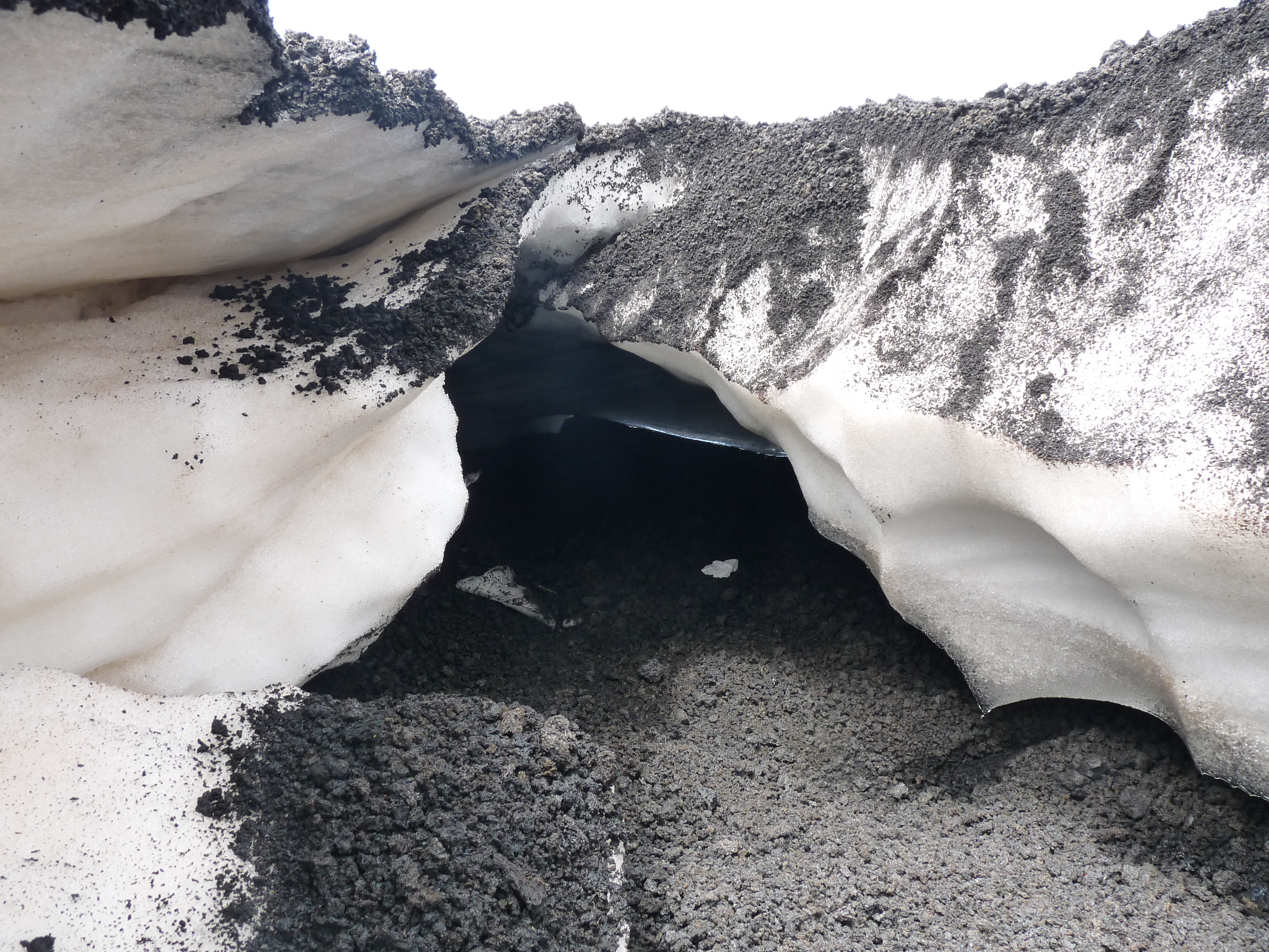 Névé recouvert de cendre volcanique (Etna, Sicile)